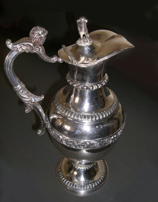 evangelischer Abendmahlskrug aus dem Jahr 1887